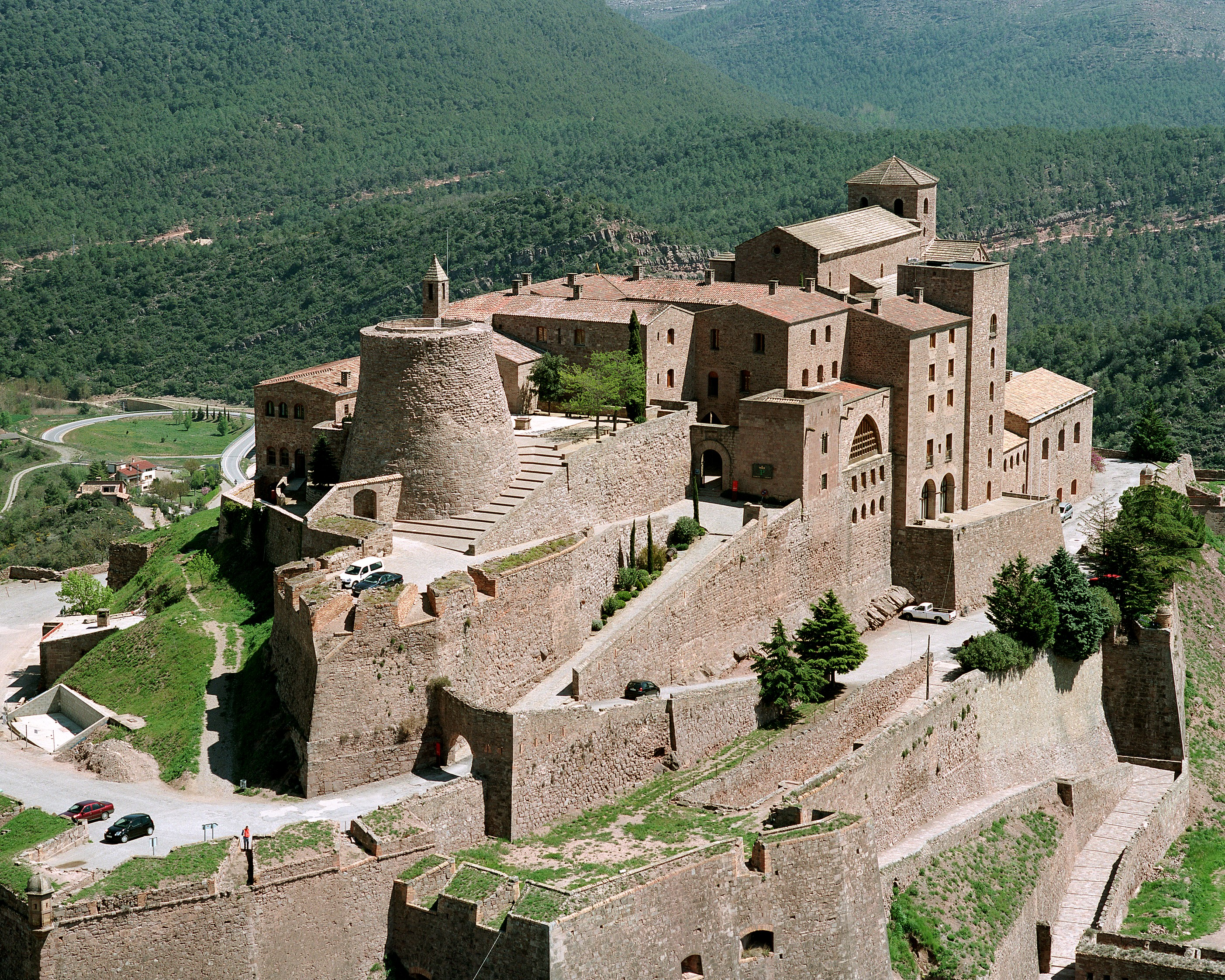 Parador de Cardona vistas